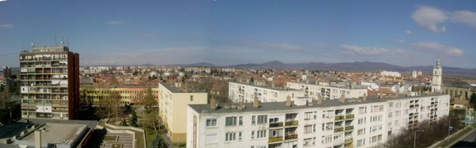 Gyöngyös látképe